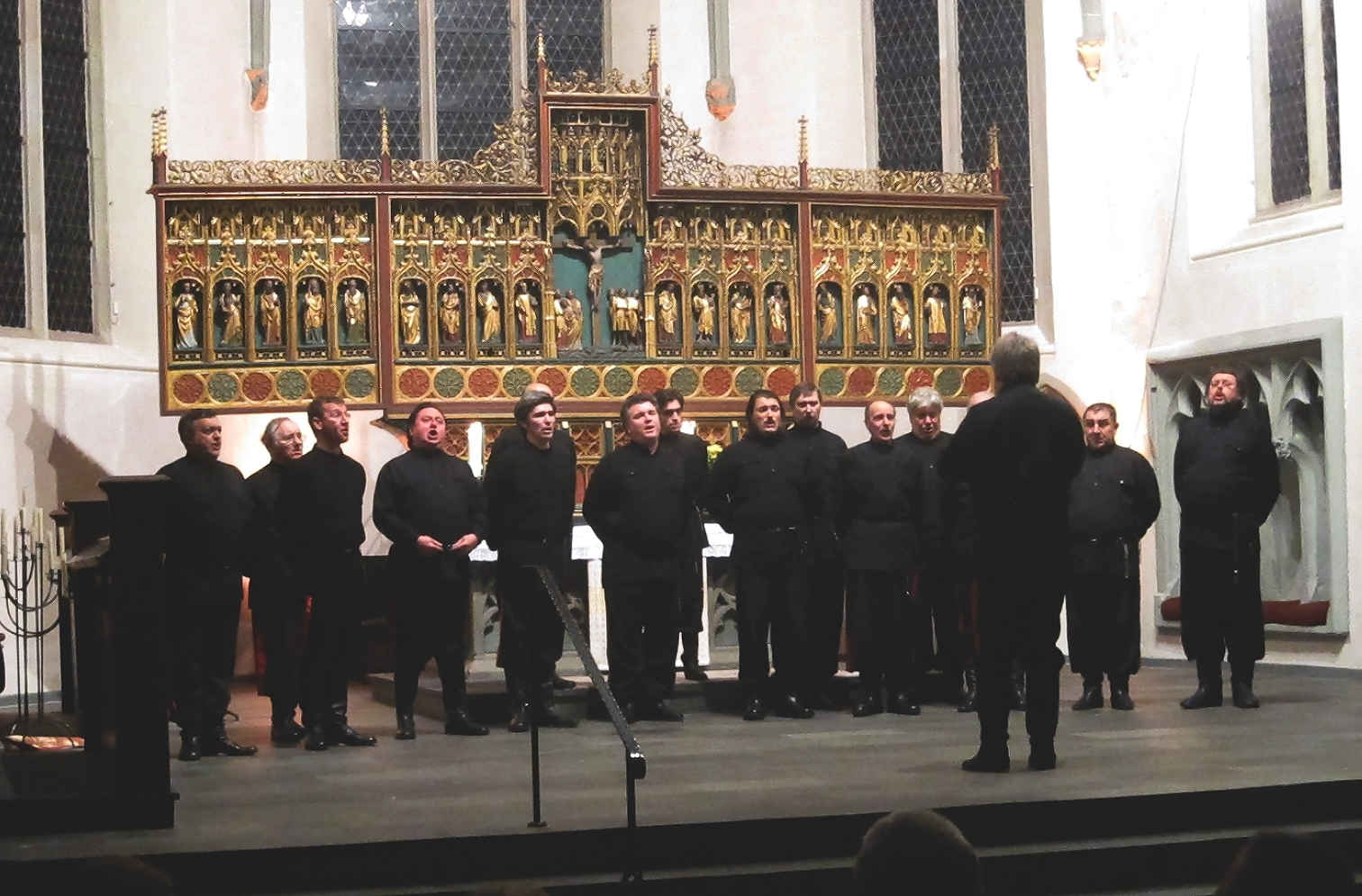 Konzert des Don Kosaken Chores Serge Jaroff, Leitung Wanja Hlibka, in der Obersten Stadtkirche in Iserlohn.